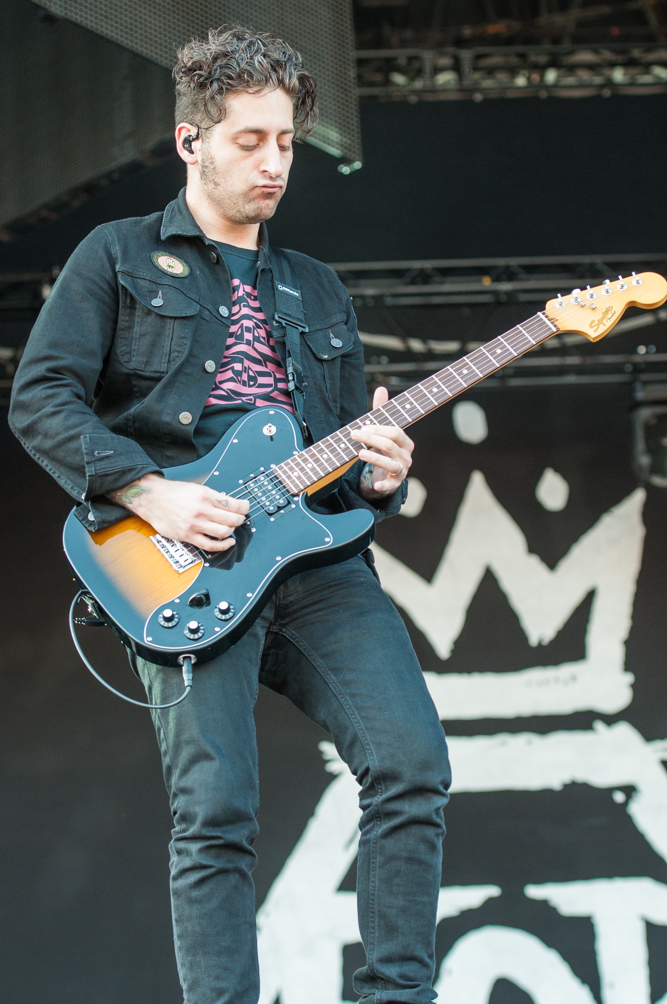 ARGO-Konzerte,Centerstage,Fall Out Boy,Joe Trohman,Konzert,Livekonzert,Livemusik,Musik,RiP,Rock im Park 2014